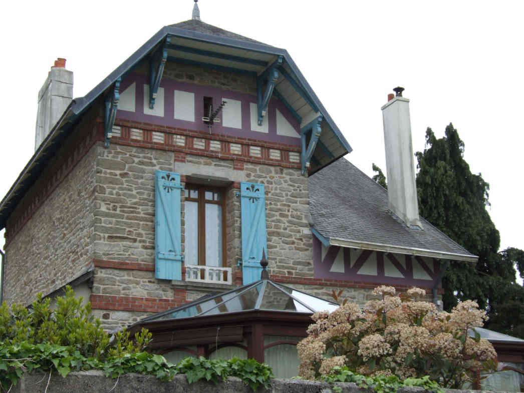 Photo prise par moi-même en mai 2006